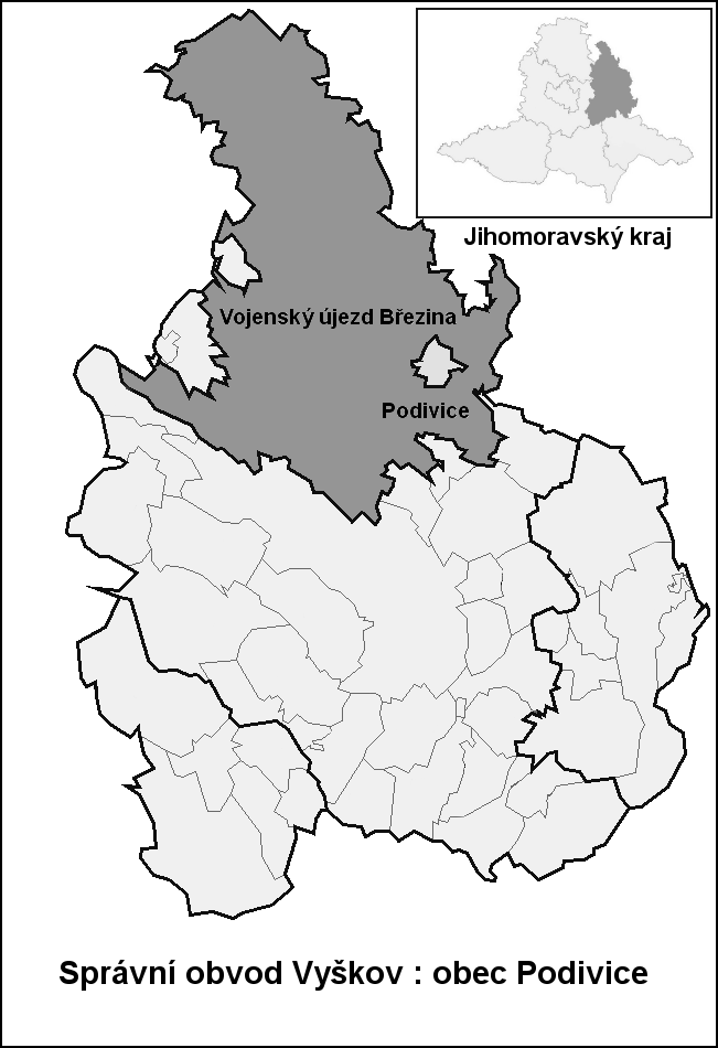 Správní obvod Vyškov: obec Podivice (Czech republic)